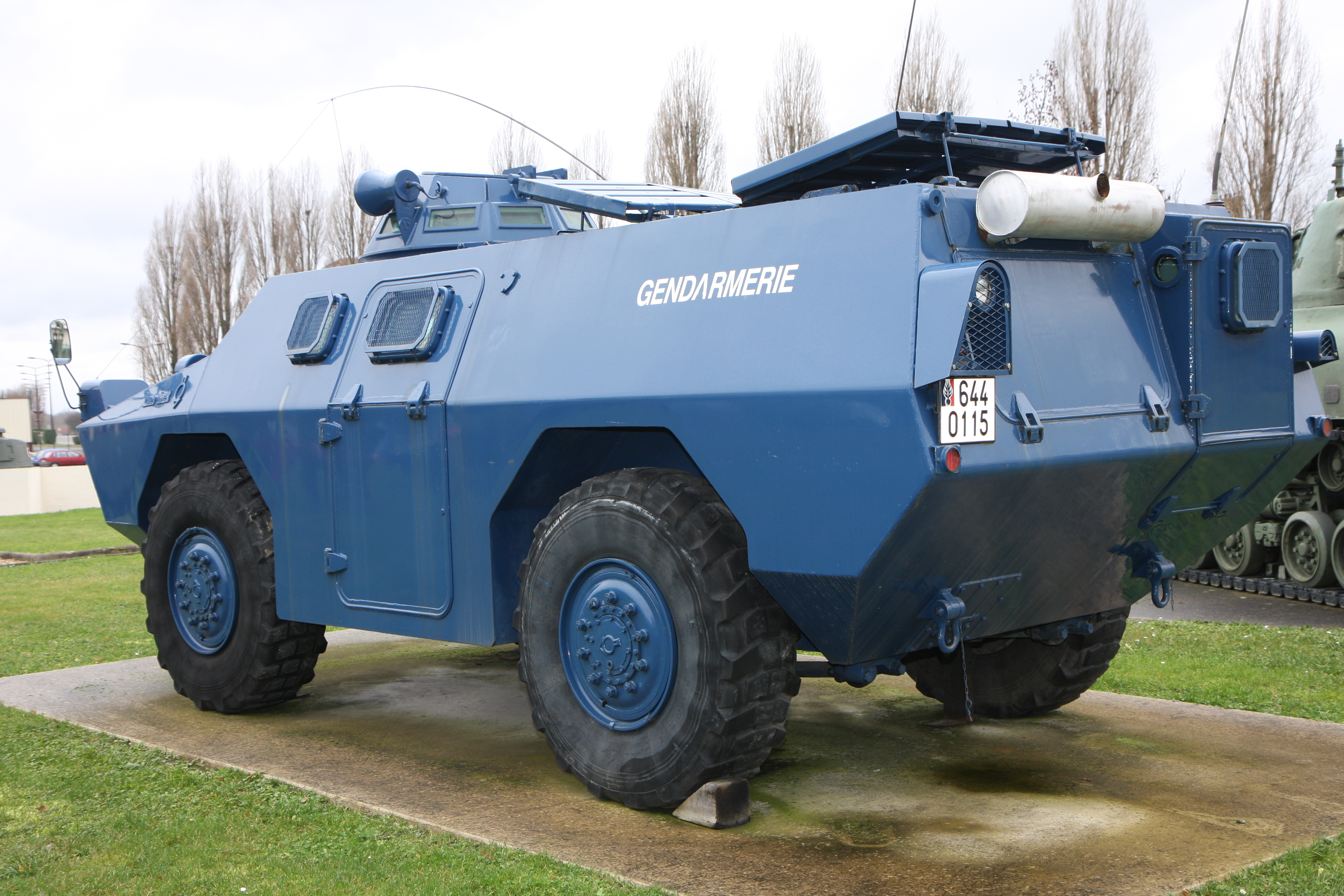 VBRG de la gendarmerie mobile à Satory-2